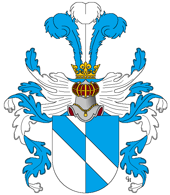 Wappen des Schauspielers und Schriftstellers Karl Marinelli (1745–1803), verliehen anlässlich seiner Erhebung in den österreichischen Adelsstand mit dem Ehrenwort "Edler von" 1801. Zeichnung von Gerd Hruška ( Für weitere Informationen zu dieser Standeserhebung siehe (